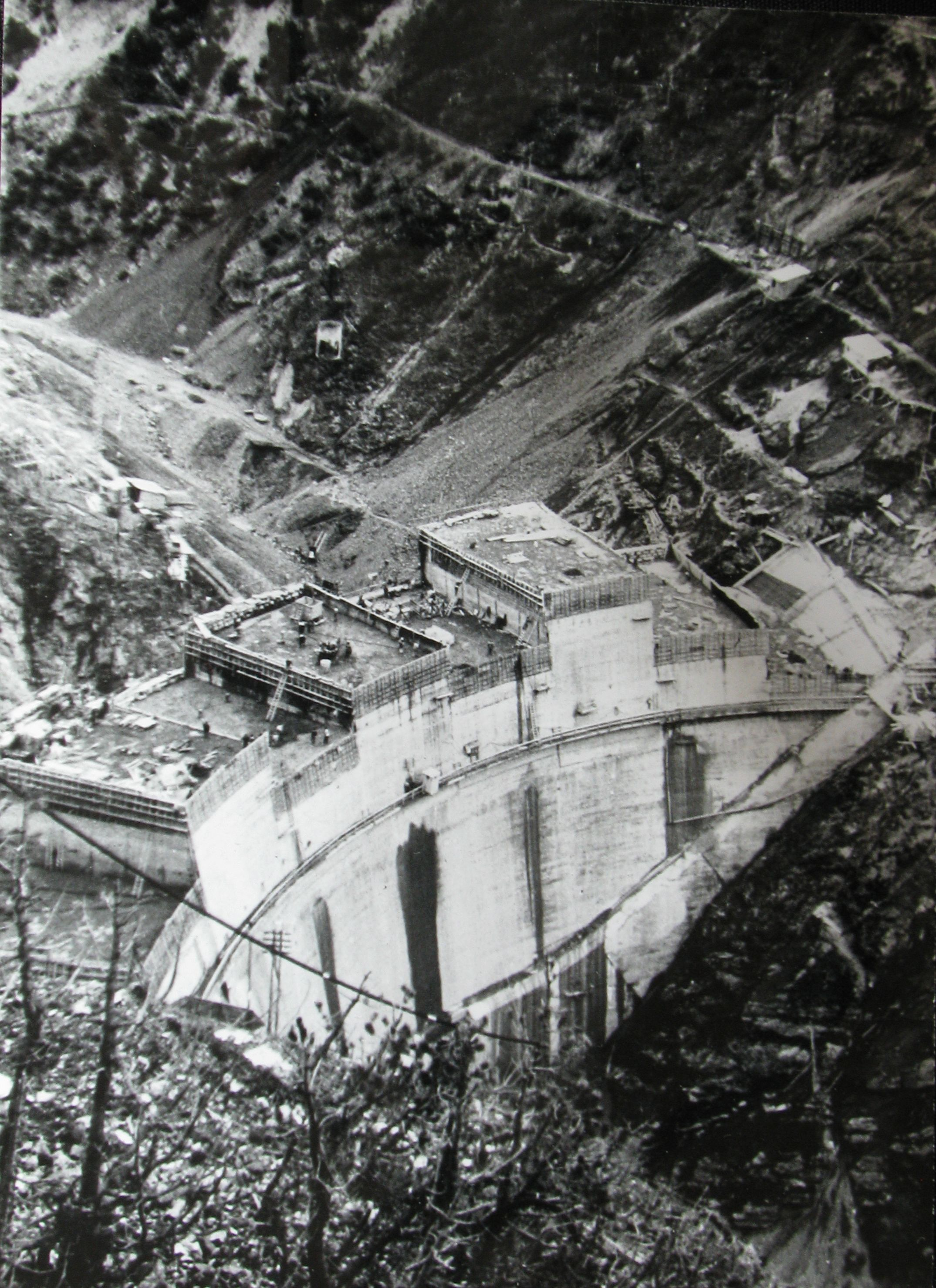 La diga di Cancano II durante la costruzione